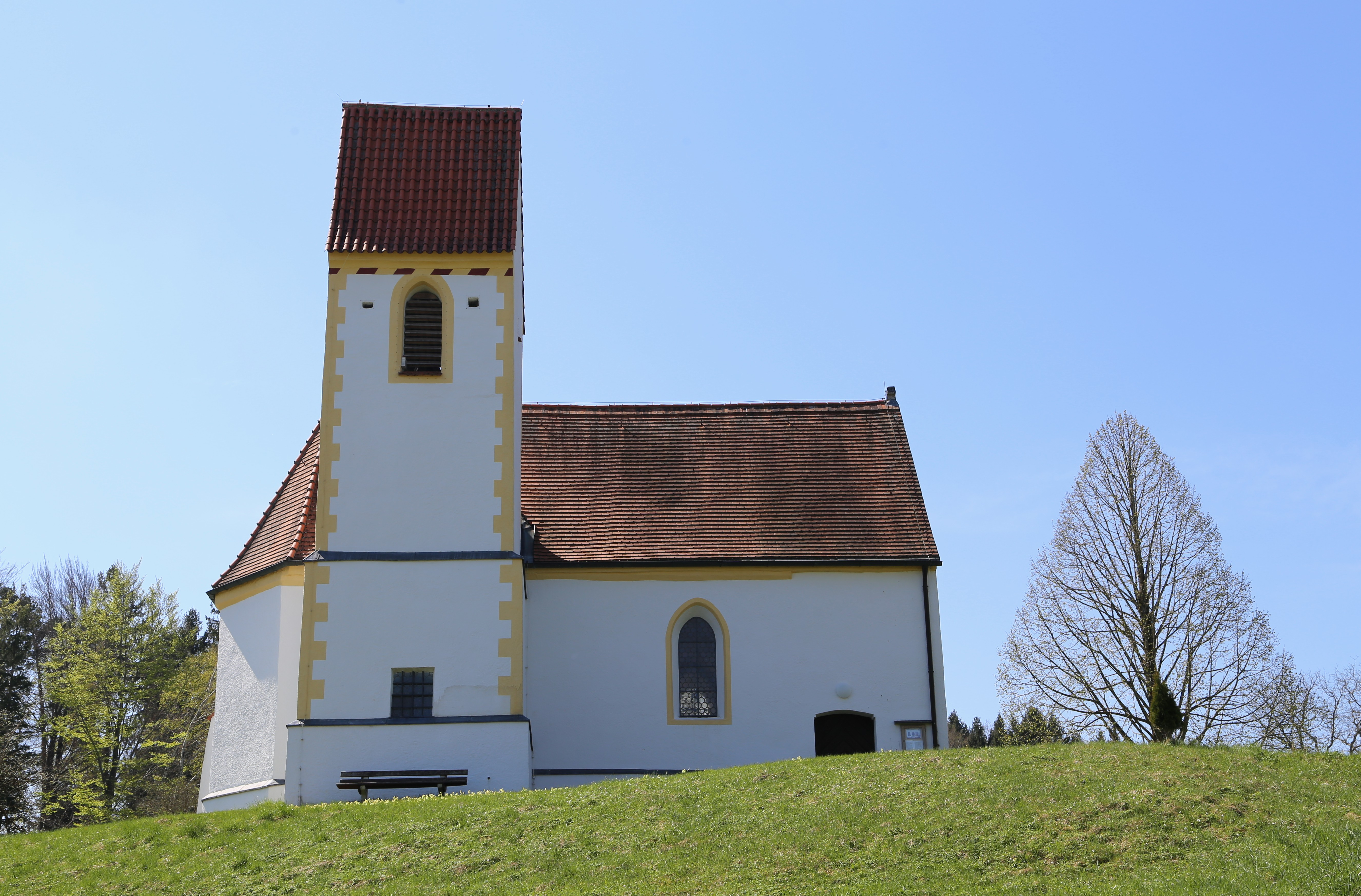 Katholische Filialkirche Mariä Verkündigung, Saalbau mit Steildach und nördlichem Satteldachturm, im Kern romanisch, spätgotischer Chor und Wölbung 15. Jahrhundert, um 1725 barocker Ausbau; mit Ausstattung. Elendskirchen, Feldkirchen-Westerham.